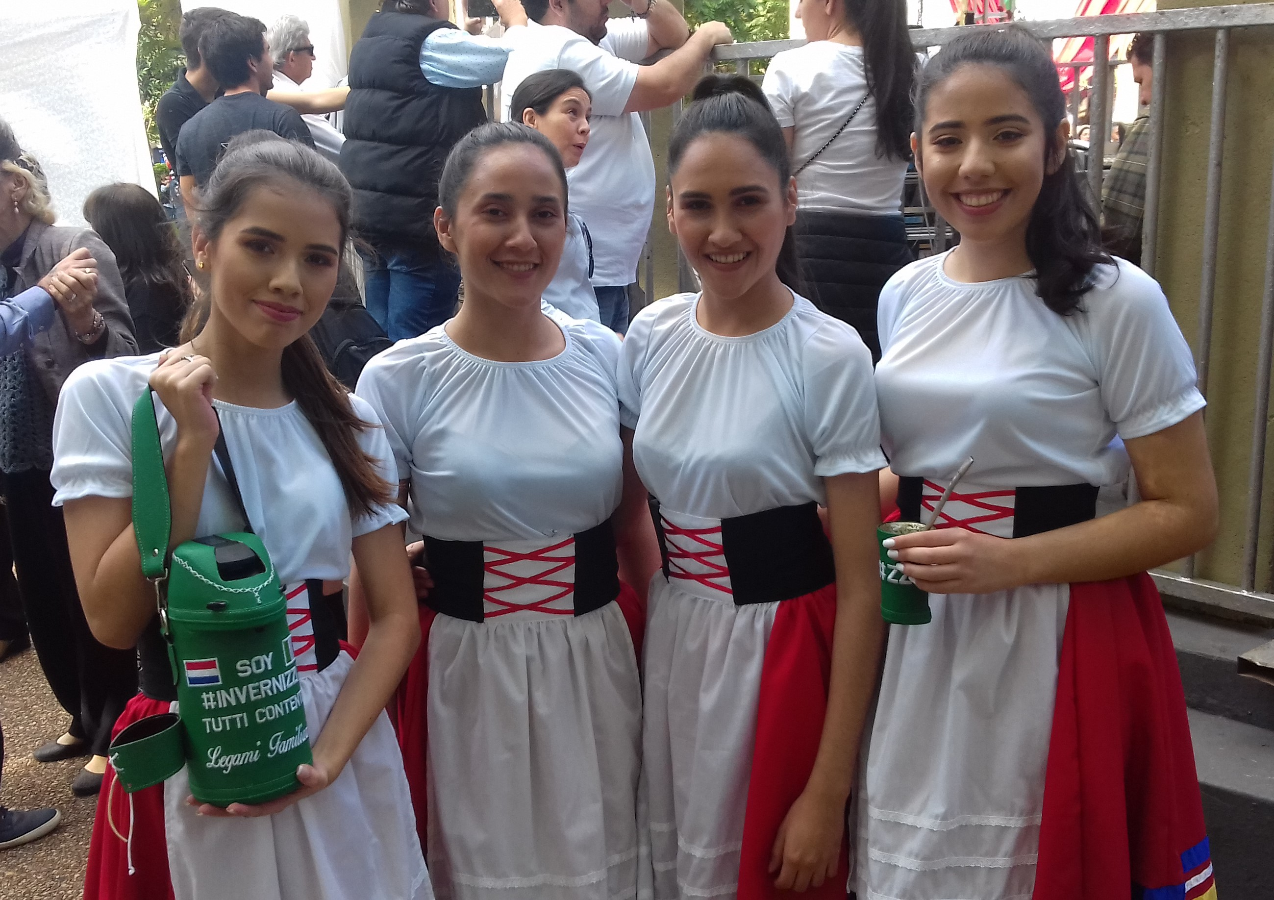 Fotografía obtenida durante la 3° edición de la Fiesta Italiana en Asunción, Paraguay (2019).